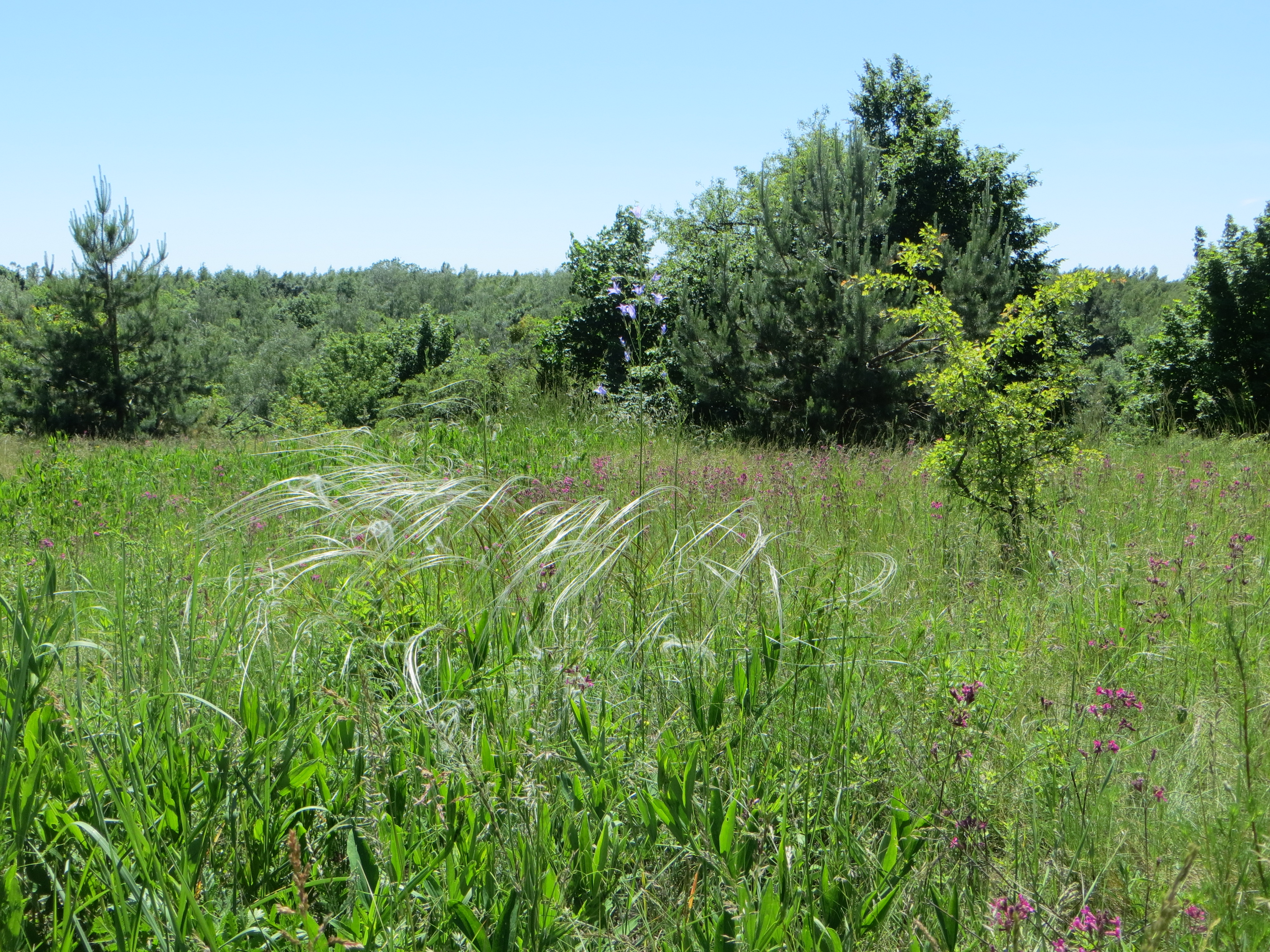 Канівський природний заповідник, м. Канів, Золотоніський район: адмінмежі Бубнівсько-Слобідської сільської ради; Канівський район, адмінмежі Пекарівської, Прохорівської, Хмільнянської, Яблунівської сільських рад